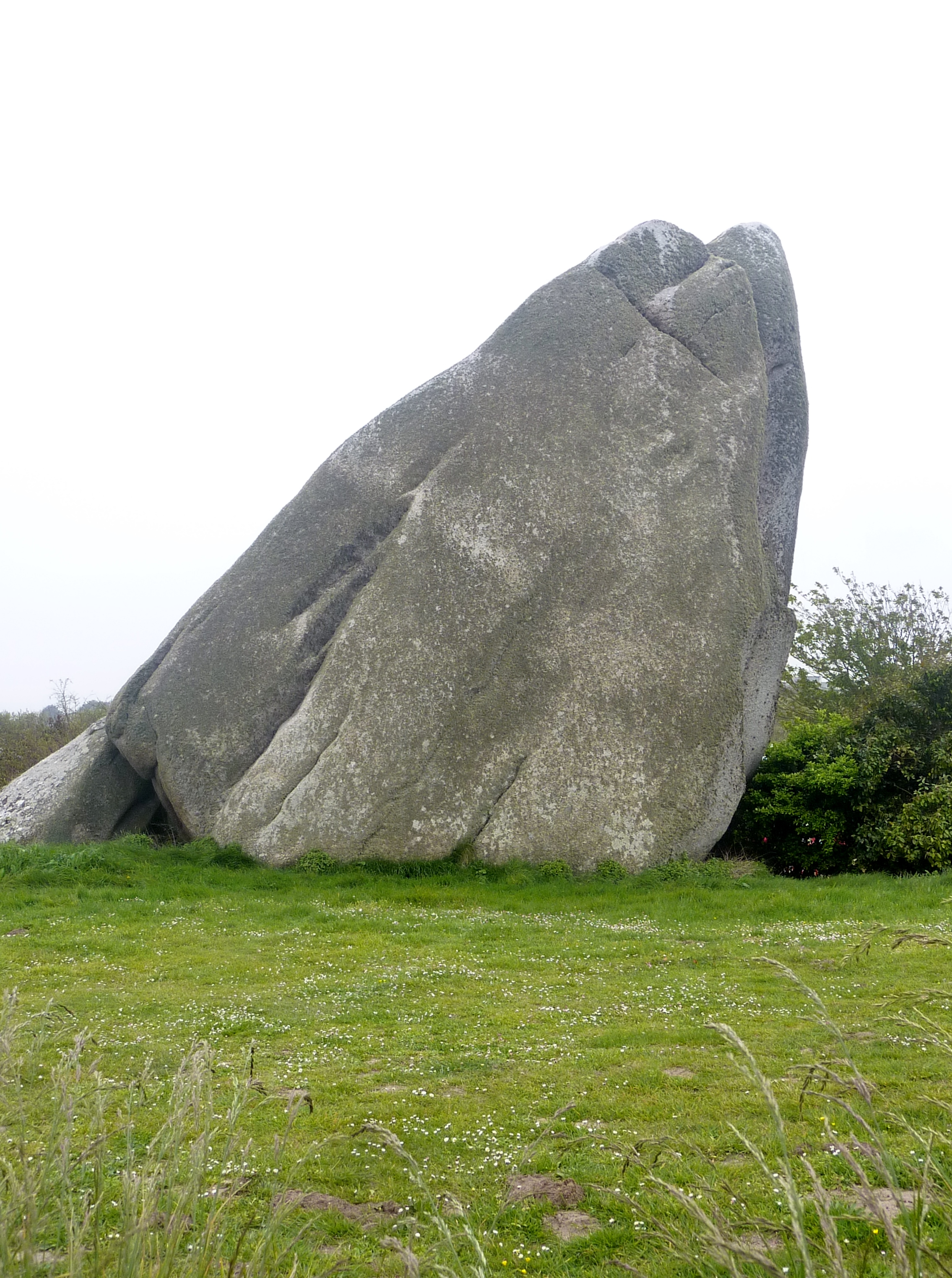 Brignogan : rocher dans la campagne (ancien îlot rocheux lors de la transgression flandrienne)